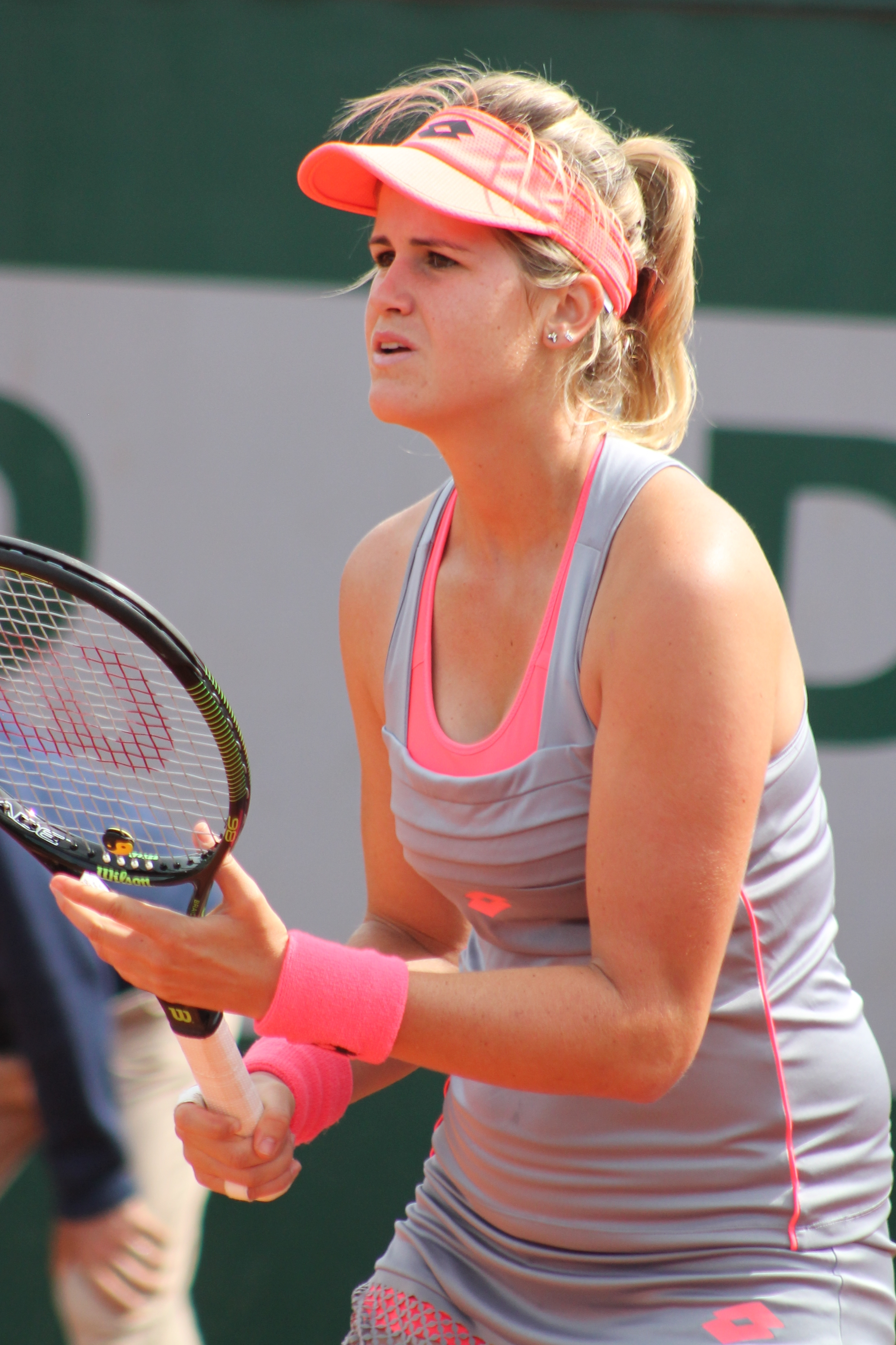 Torro Flor RG15 (26)